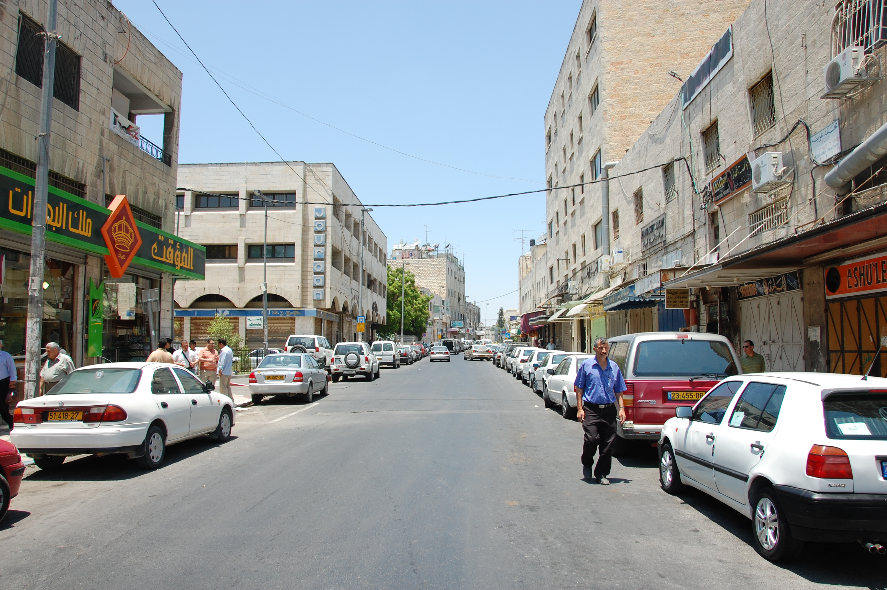 salah a din st. in jerusalem